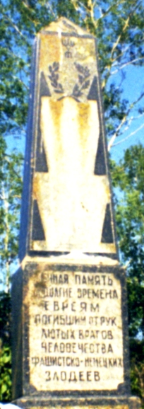 Памятник убитым во время Холокоста евреям Лукомльского гетто (Витебская область).